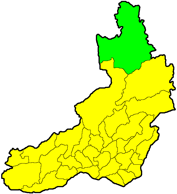 Каларский район на карте Забайкальского края